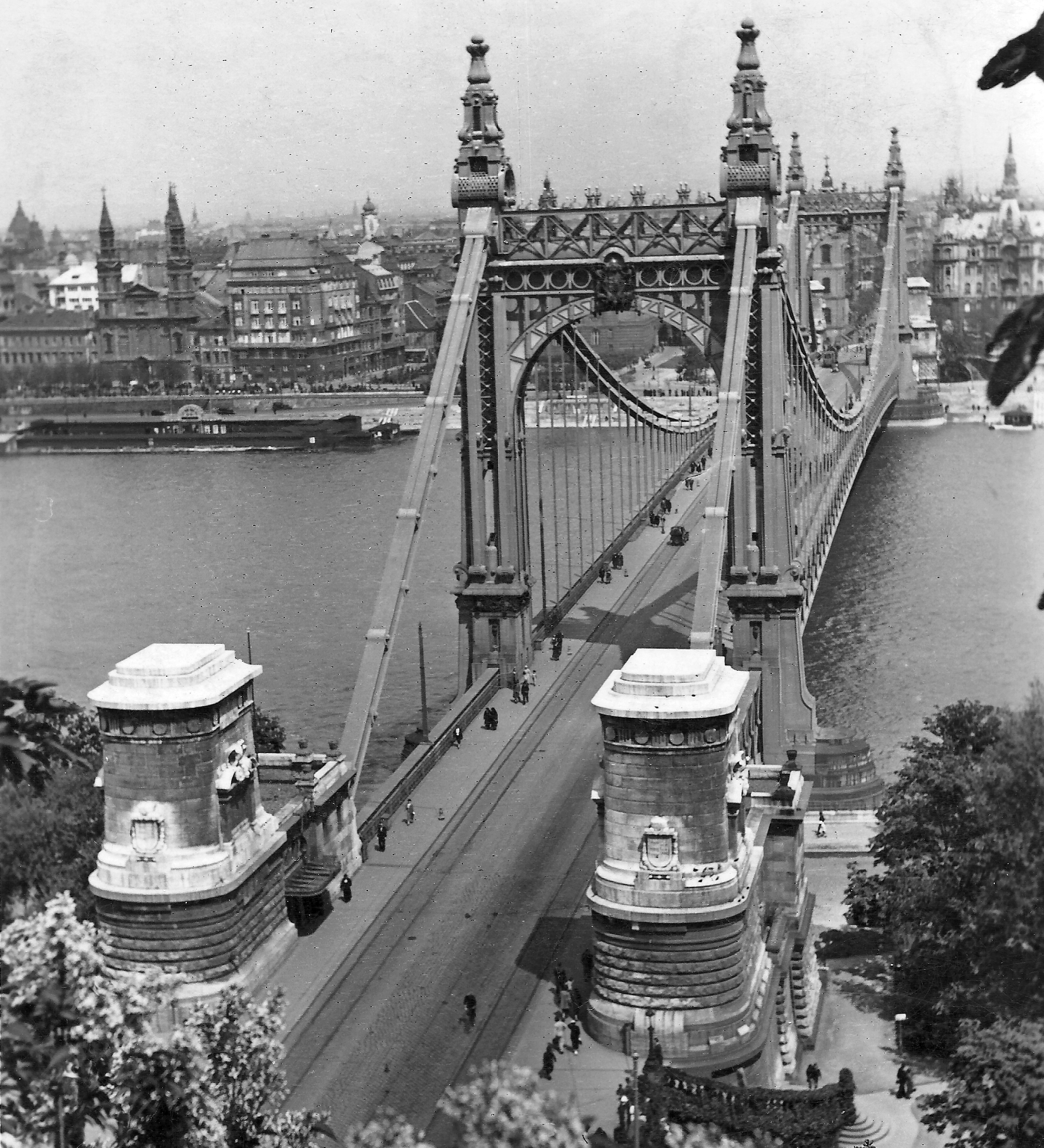 Erzsébet híd a Gellérthegyről. Location: Hungary, Budapest Tags: bridge Title: Erzsébet híd a Gellérthegyről.